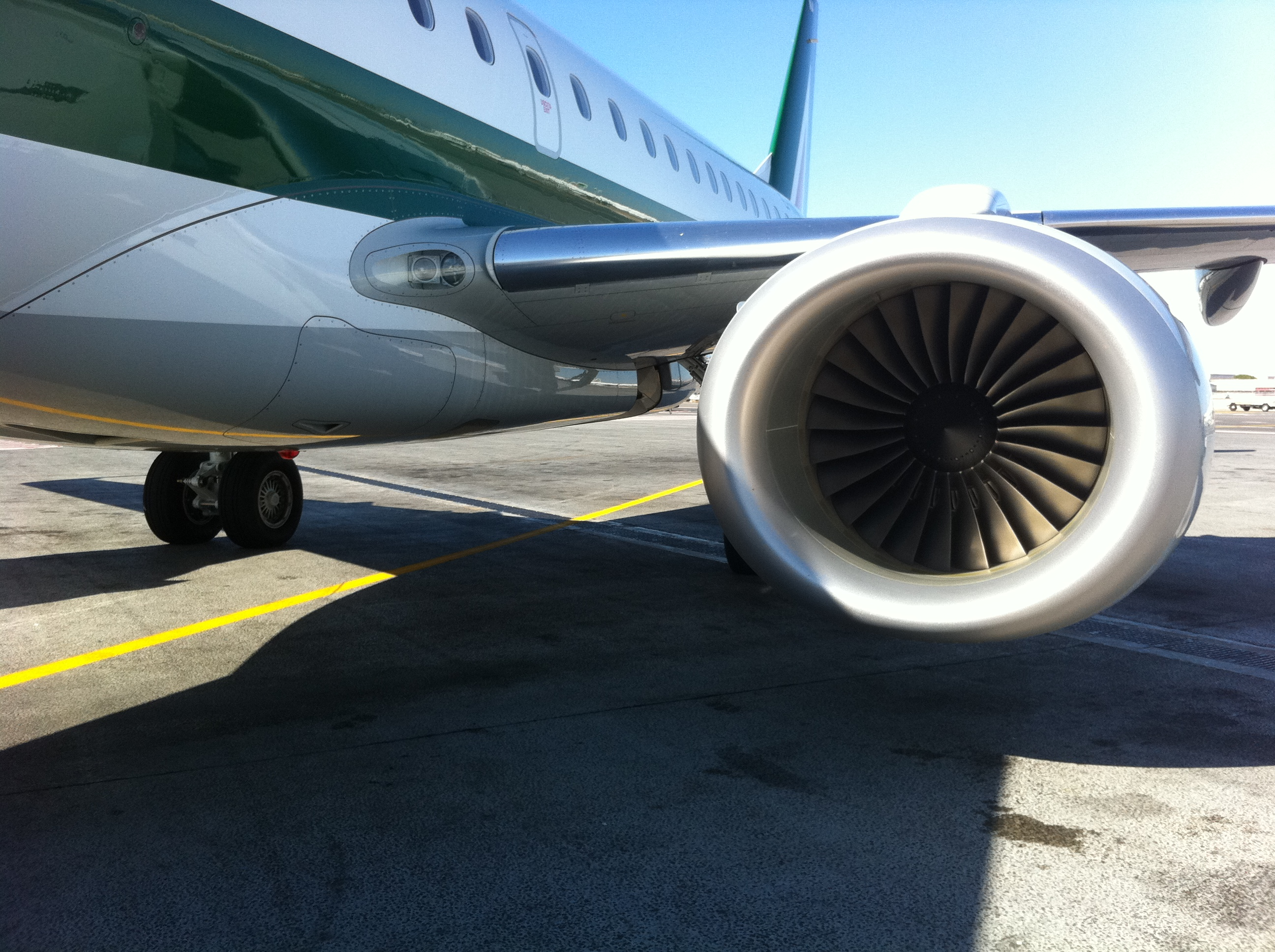 E-190 Alitalia CityLiner a Roma FCO